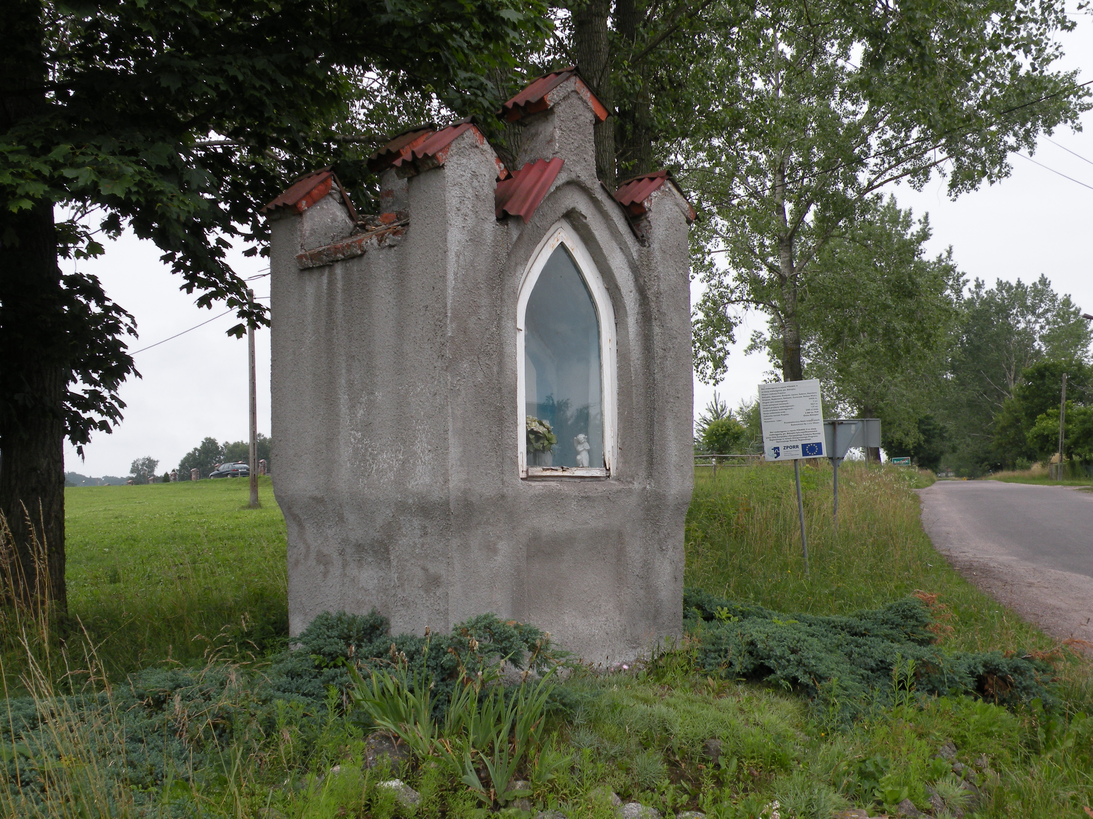 Bredynki